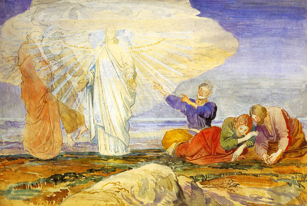 Преображение